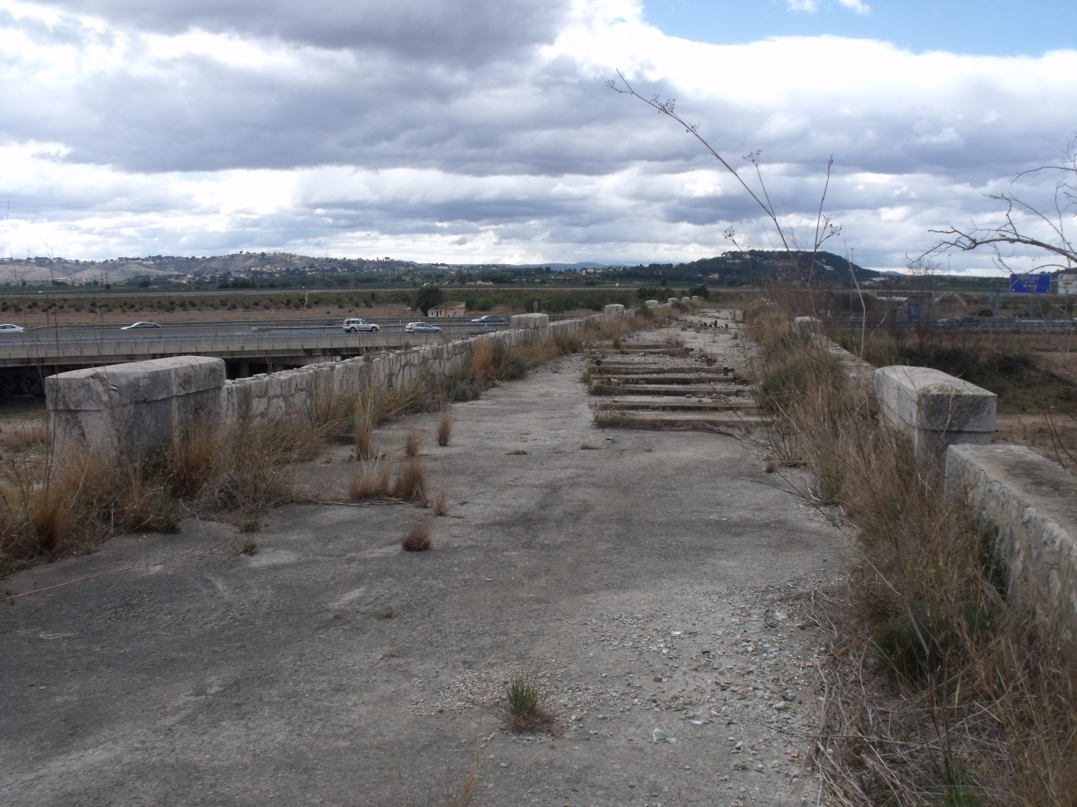 Puente nuevo en la A3 desde el puente viejo en la rambla del Poyo.